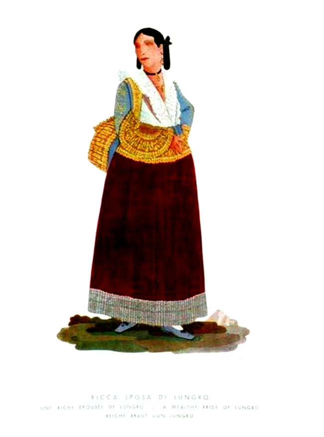 Costume ricca sposa di Lungro intorno al 1830